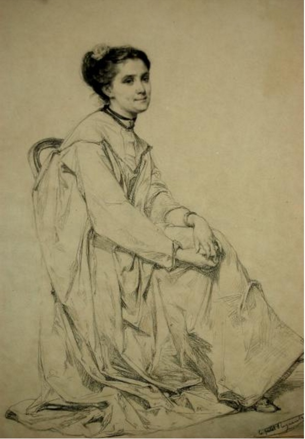 Portrait de Nélie Jacquemart à Rome, dessin à la mine de plomb.